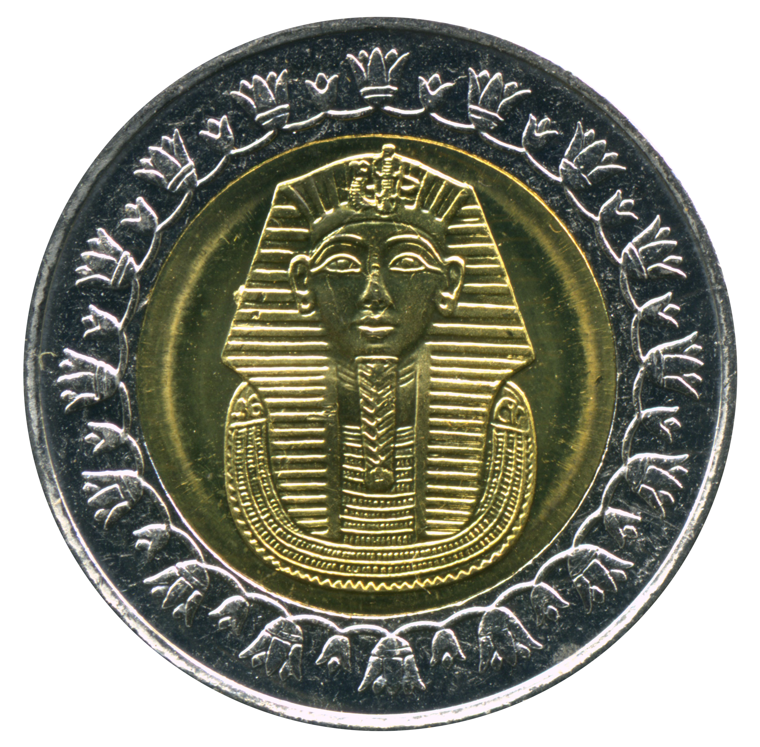 "Kingtutcoinobv.jpg" avec le fond transparent